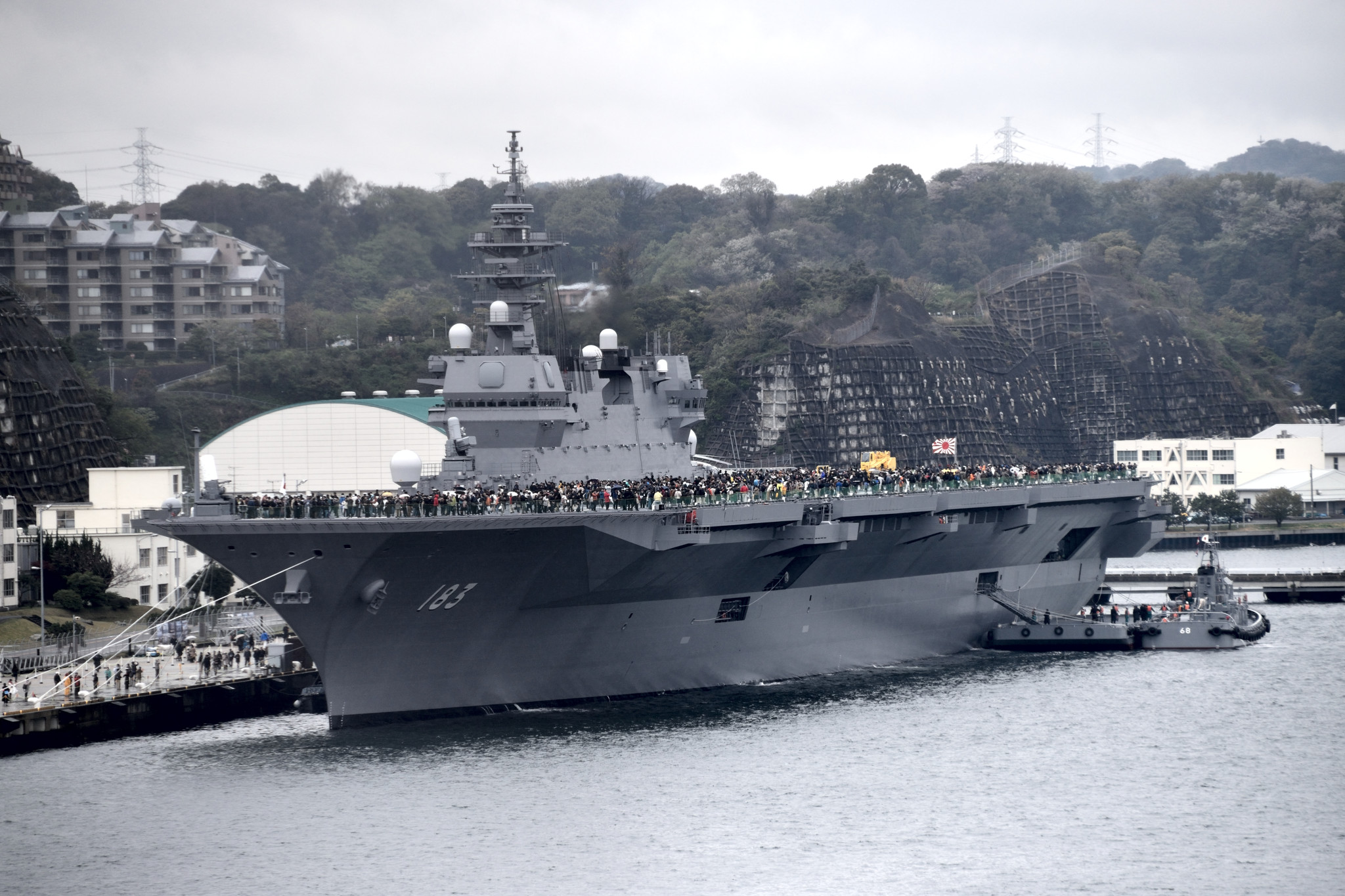 横須賀・逸見岸壁で一般公開中の護衛艦いずも。就役から約2週間後。